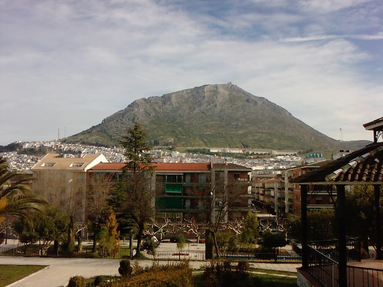 Peña de Martos, vista desde el Parque Manuel Carrasco de Martos (Jaén), España.